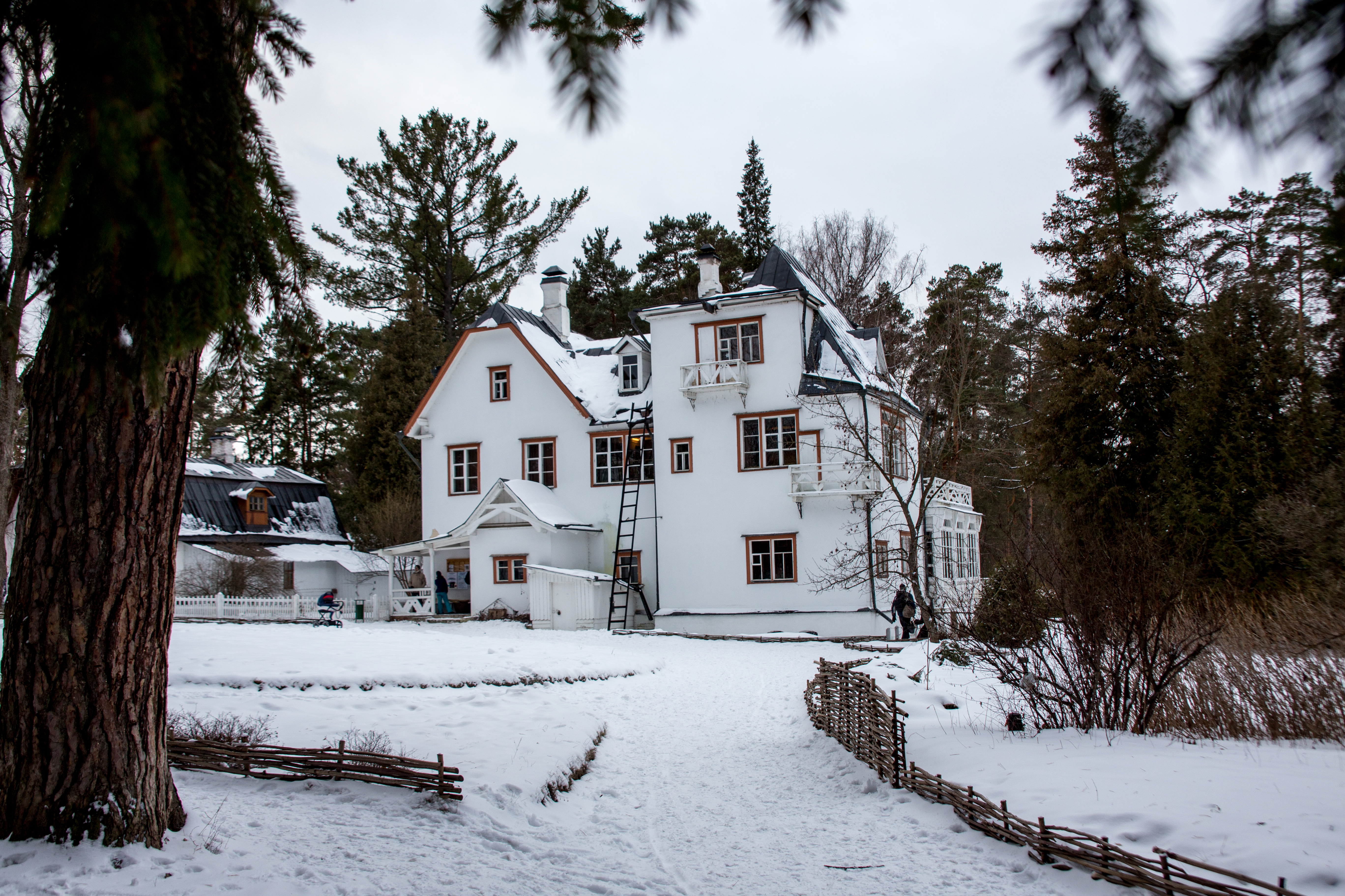 Зеленая зона музея-усадьбы В.Д. Поленова, Заокский район This image is related to the protected area of Russia number 7100037